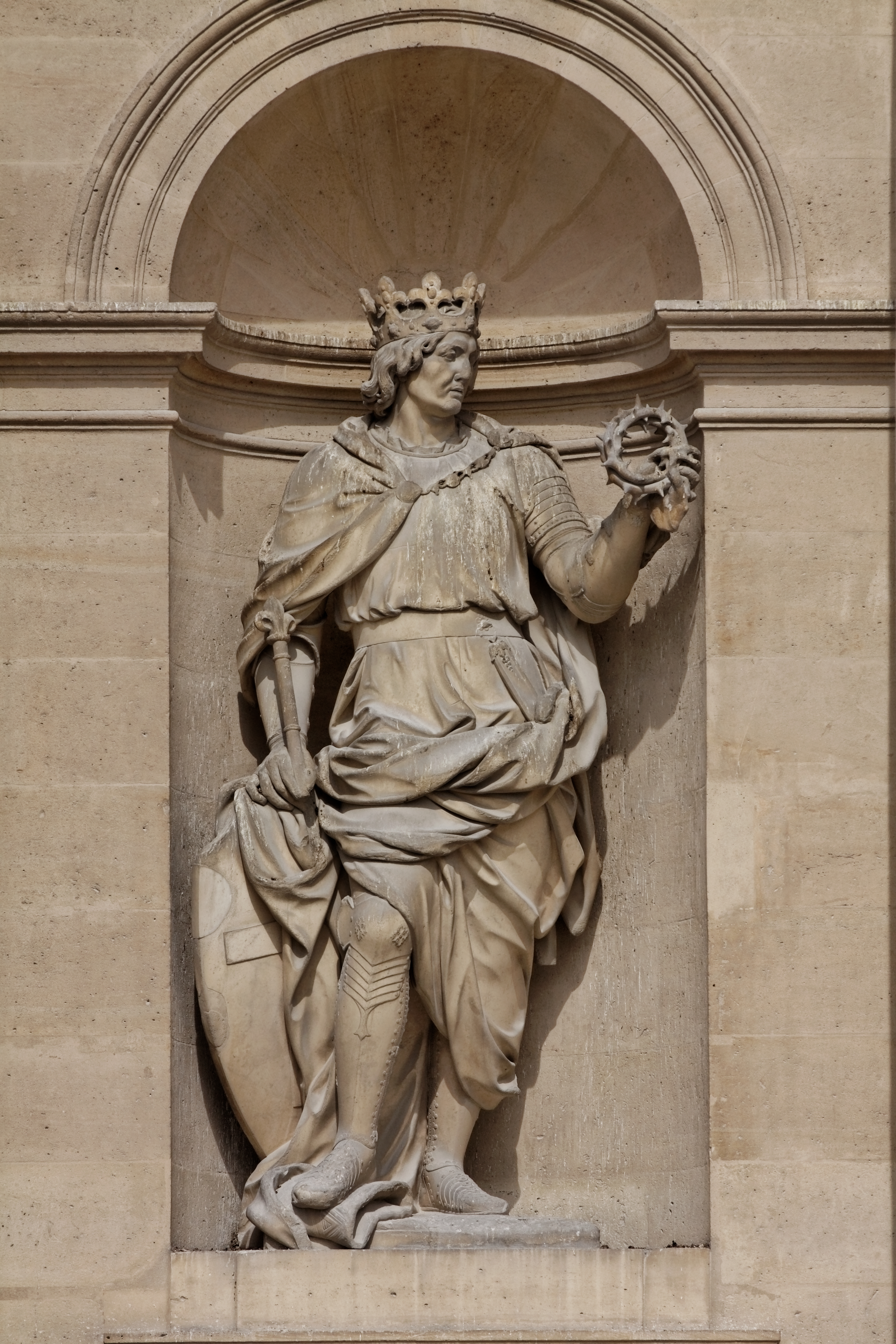 Nicolas Coustou (Français, 1658-1733): statue colossale en pied de Saint Louis portant couronne et sceptre, tenant la couronne d'épines, un bouclier au pied droit, 1701-1706, marbre, façade principale du Dôme des Invalides, Paris, France.